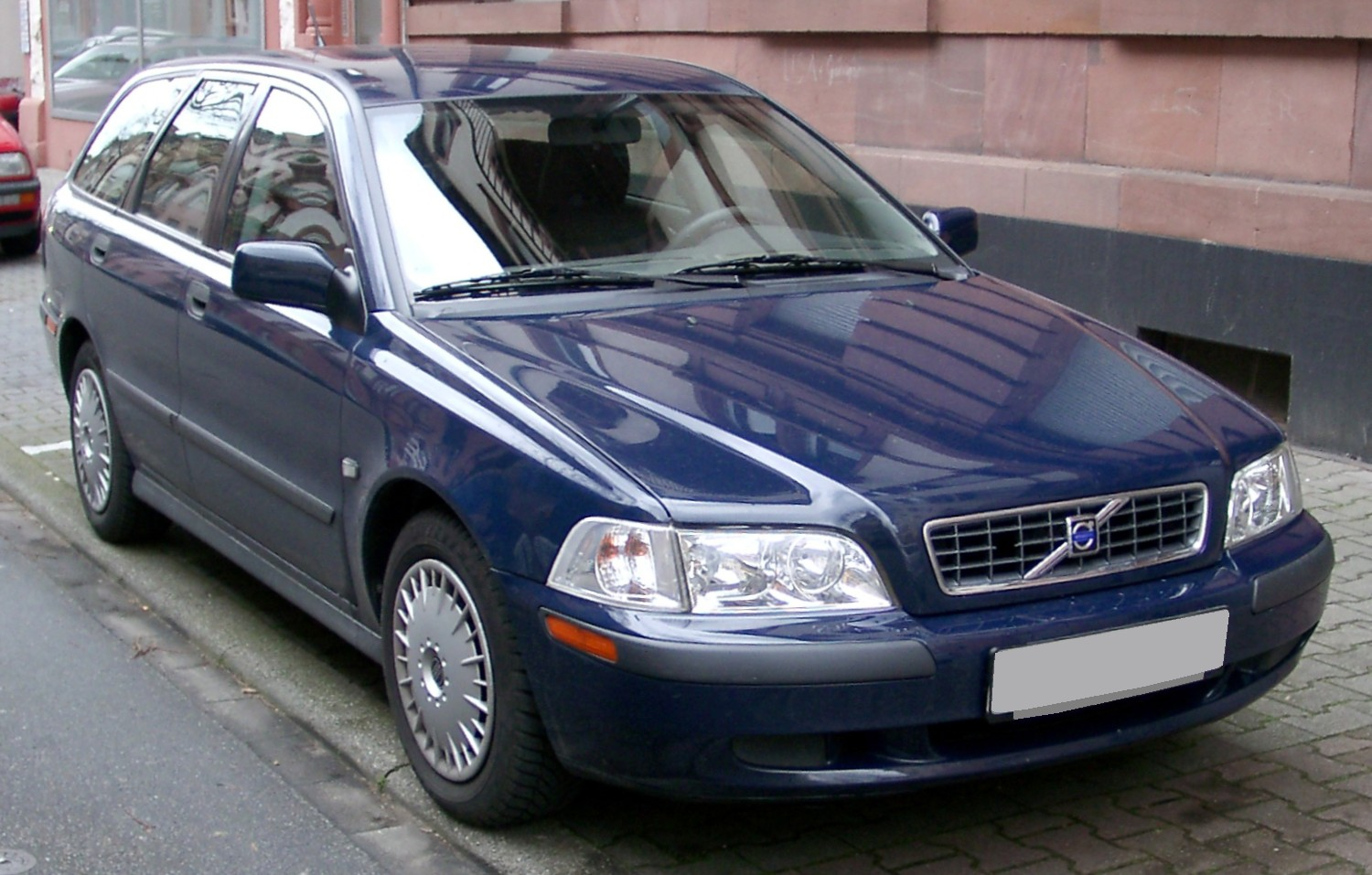 Volvo V40